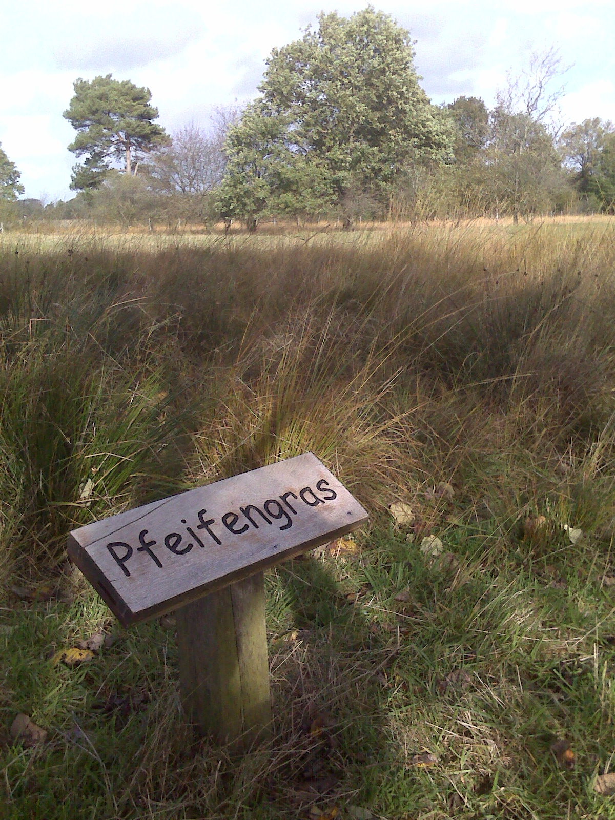 Pfeifengras in der Störkathener Heide